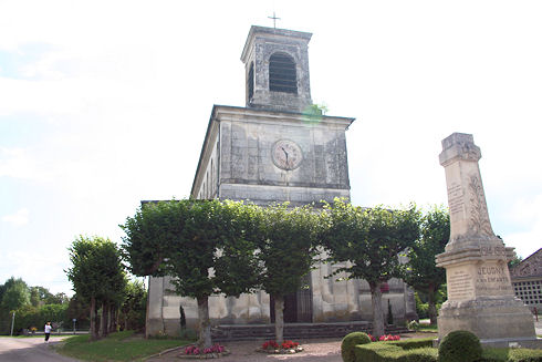 Eglise de Jeugny